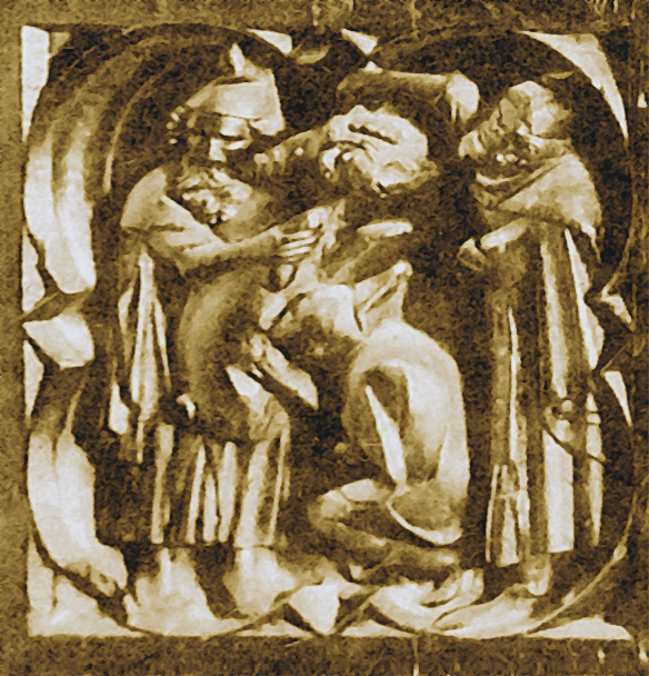 Das Bild ist die um den breiten weißen Rand verminderte Tafel XIX aus dem genannten Buch. Den Scan hat der Original-Uploader aus dem Internet Archive, dort ist das Bild unter der Kennung gri_33125006433185 als Tar-Archiv mit den Originalscans aller Buchseiten verfügbar. Der Buchautor Heribert Reiners starb laut Wikipedia und DNB erst 1960, die DNB gibt als alternatives Todesjahr 1956 an. Damit ist der Textanteil des Buches nicht gemeinfrei. Das Urheberrecht an veröffentlichtem Fotomaterial fällt jedoch nicht dem Buchautoren zu, es bleibt beim Fotografen. Das Buch von Reiners nennt für die Bilder keinen Fotografen, jede einzelne Seite wurde angeschaut. Der Fotograf ist „unbekannt“. Die Jahresangabe „1909“ für die Veröffentlichung wurde dem Buchtitel entnommen und durch Recherchen in Bibliothekskatalogen verifiziert. Unter dem gleichen Titel hat Reiners ebenfalls 1909 seine Dissertationsschrift bei der Universität Bonn veröffentlicht. Diese Dissertation enthält den Angaben der Bibliothekskataloge zufolge keine Fototafeln, ist also hier nicht hilfreich. Leider sieht der Original-Uploader keine Möglichkeit mehr, in Bezug auf die Identität und die Lebensdaten des Fotografen weiterzukommen.